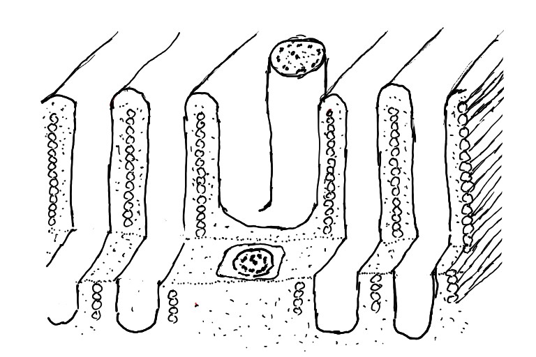 Схема гребенчатой тубулеммы опалины по: КарповС.А., Стоение клетки протистов, 2001